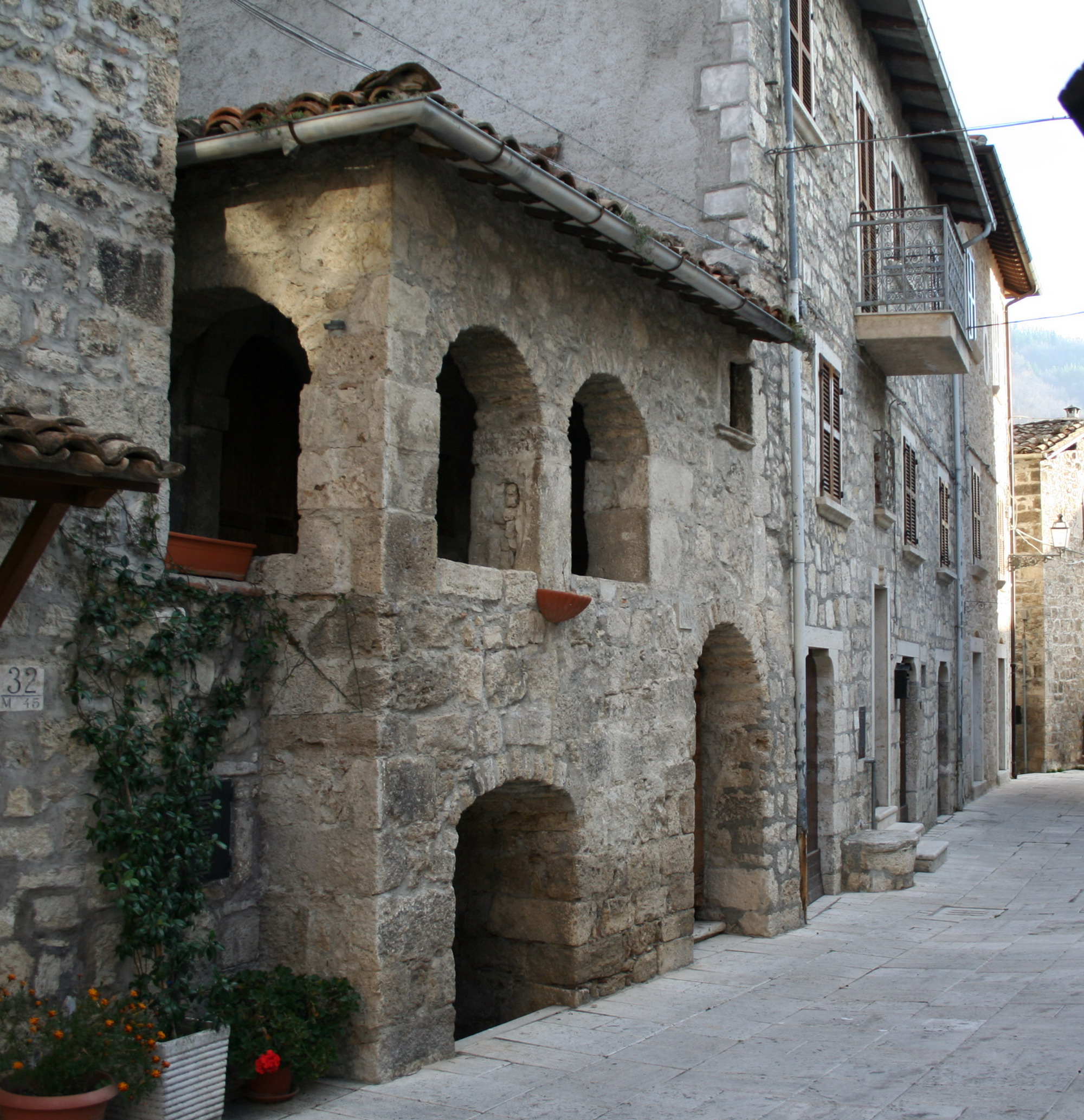 Castel Trosino (Ascoli Piceno) – Casa di Re Manfrì, esterno giorno, proprio scatto Sibilla.io "Utilizzo concesso" Ticket#2007040410014627 (ticket per le immagini) This file is licensed under Creative Commons 2,5 license